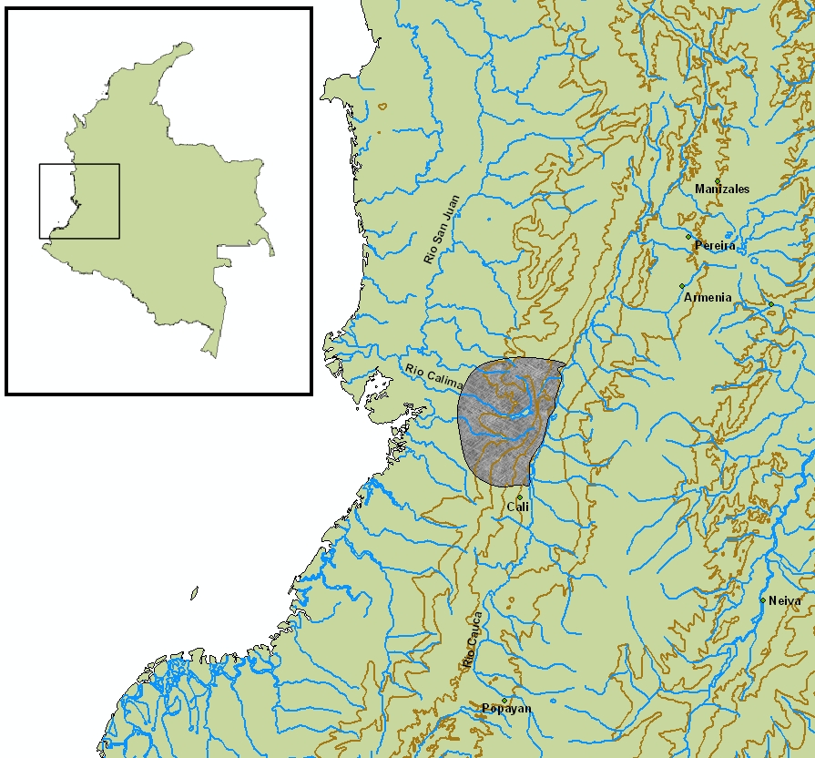 cultura Yotoco, Valle del Cauca, Colombia